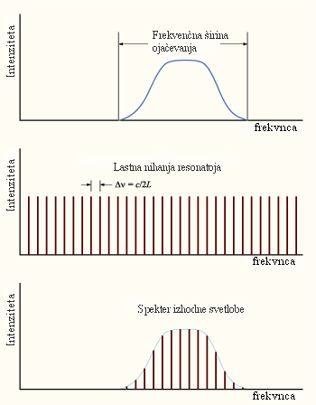 Esquema de funcionamiento de Mode-Locking